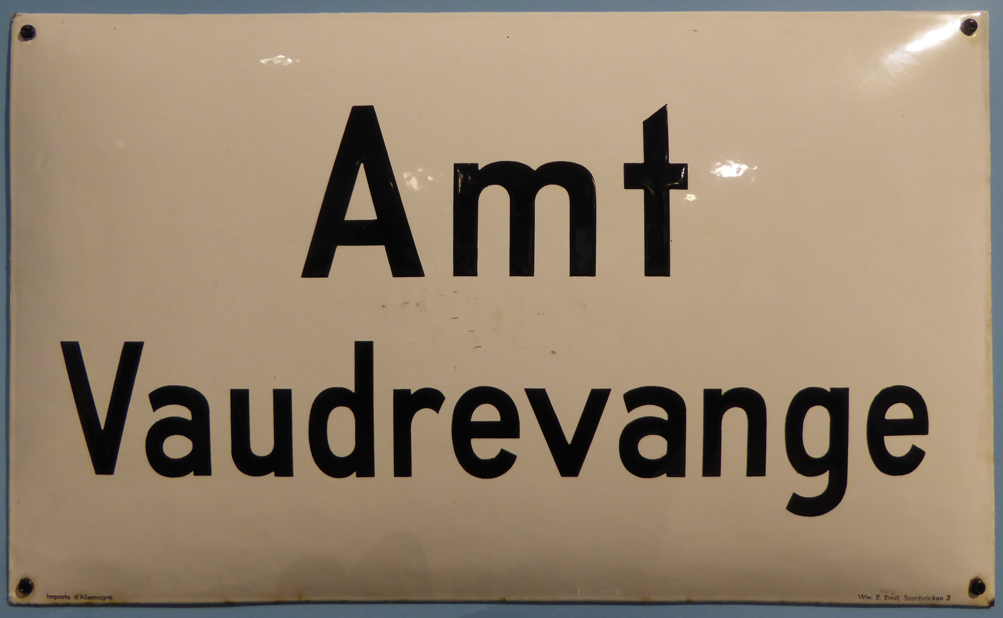 Wallerfangen, Amtschild des Ortes in französischer Bezeichnung aus der Nachkriegszeit, Email auf Blech